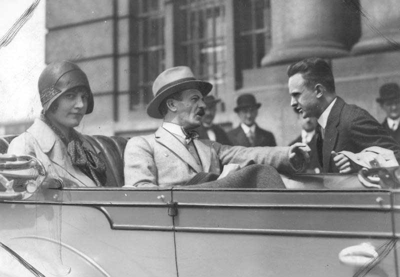 Polish Prime Minister Kazimierz Świtalski with his wife, Janina.